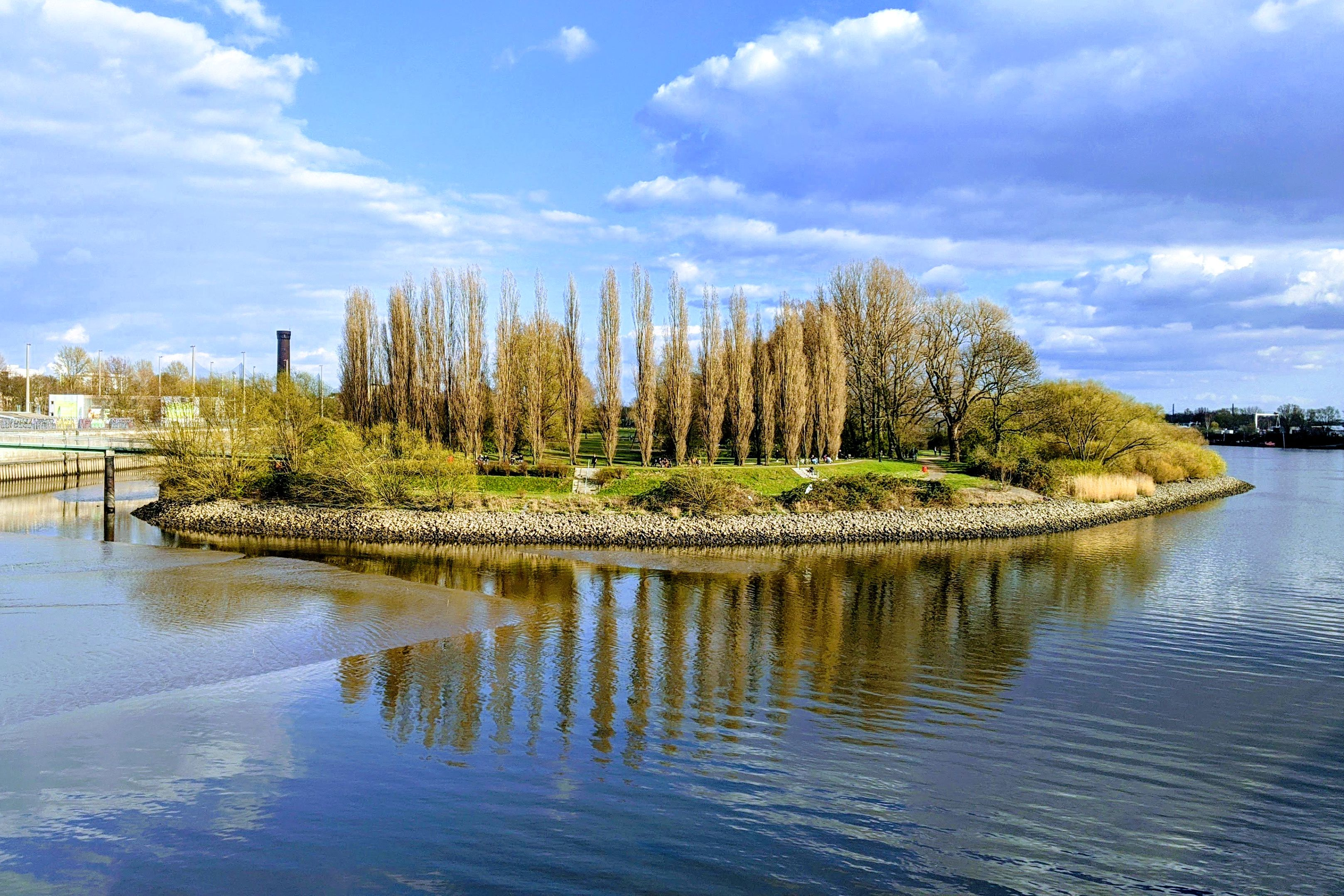 Halbinsel Entenwerder in Hamburg-Rothenburgsort, Blick von der Billhorner Brücke